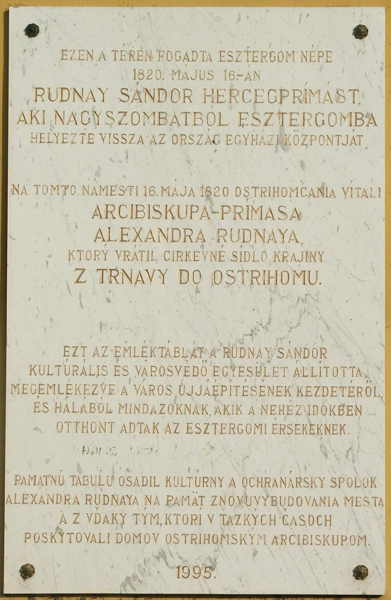 Emléktábla a Kerektemplomon